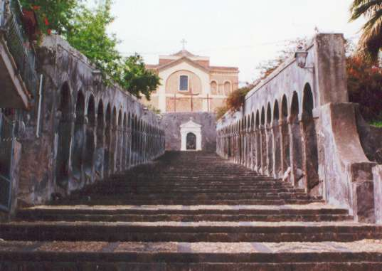 La scalinata settecentesca della Chiesa madre di Santa Maria dell'Alto di Paternò